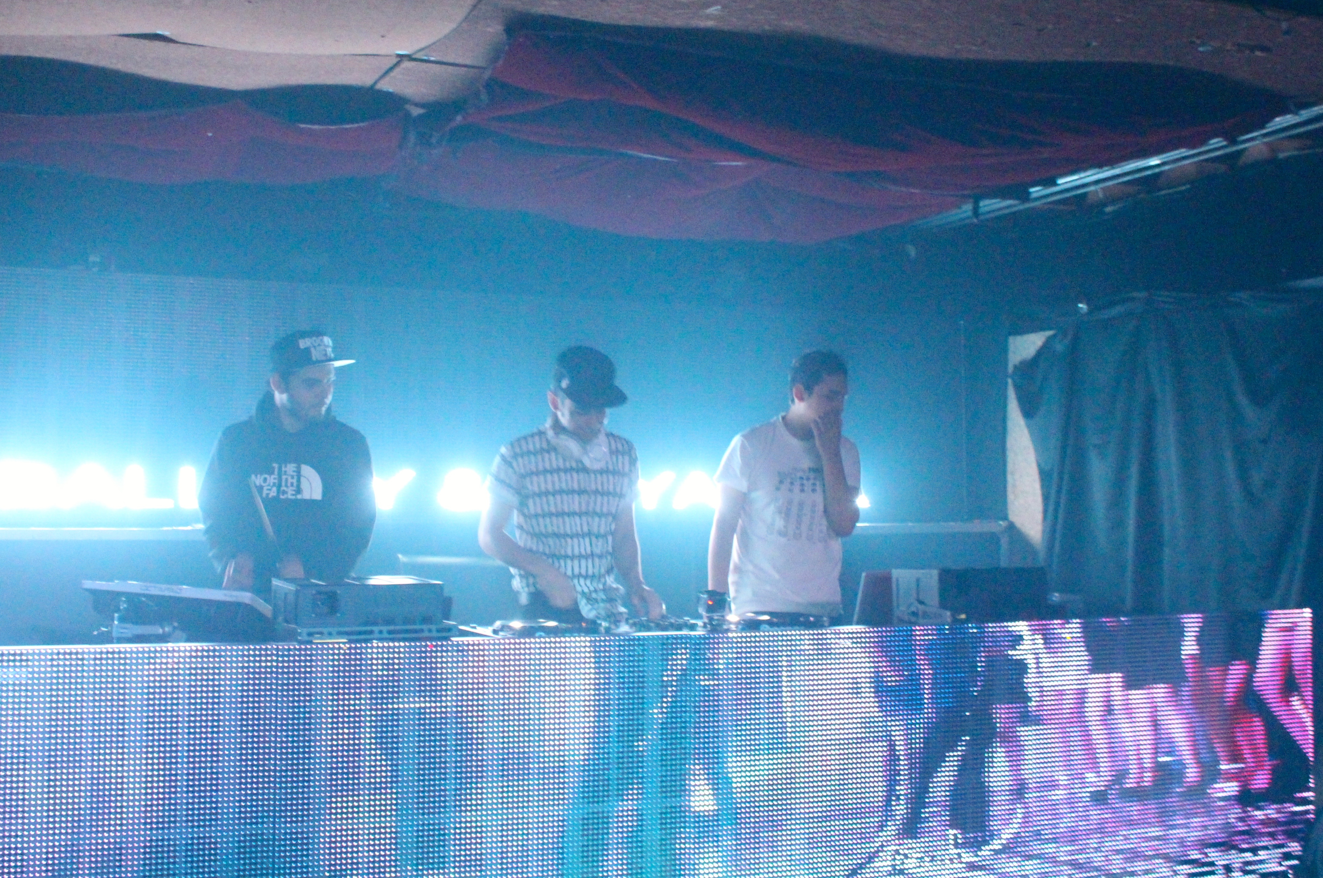 3BALLMTY in 2014.